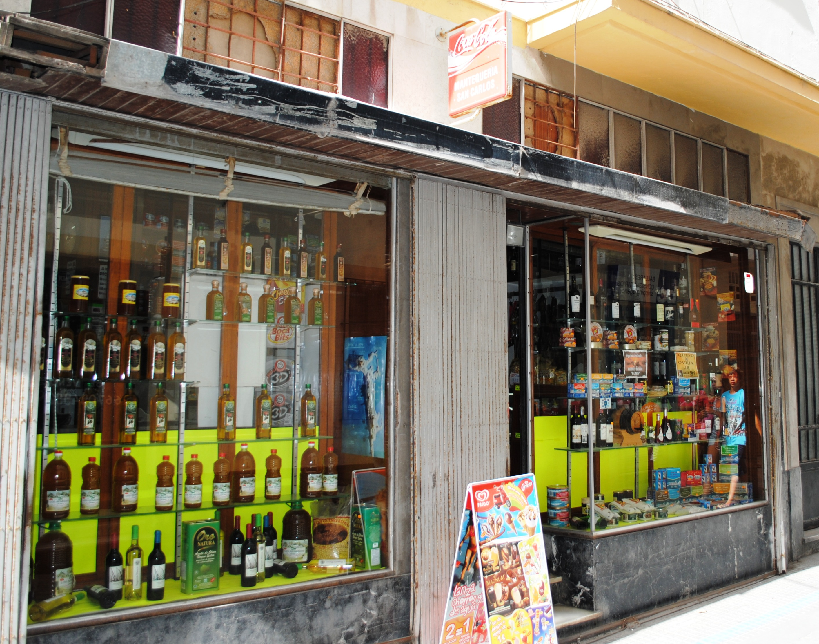 Escaparate de la mantequería San Carlos en la calle Fermín Salvochea de Cádiz.